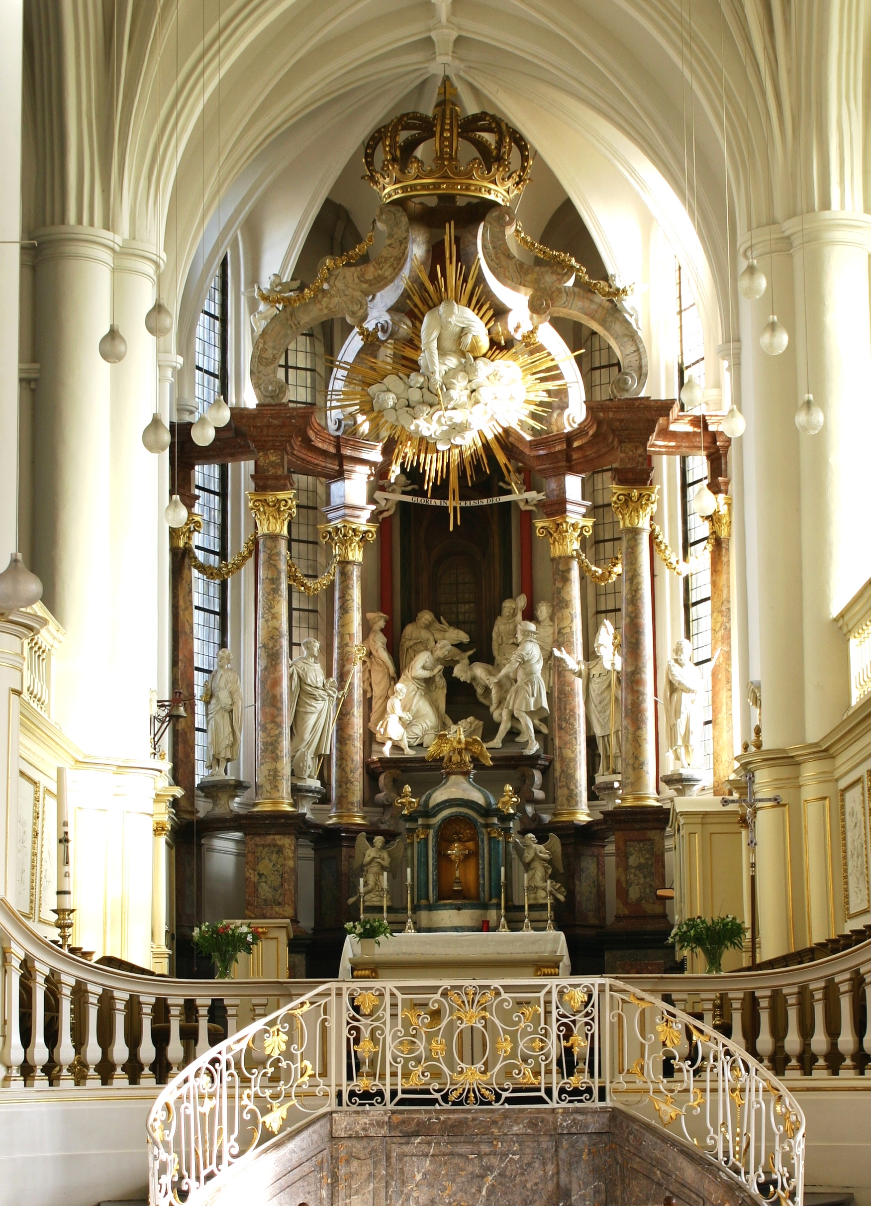 De Chouer an den Haaptaltor an der Abteikierch zu Thorn.